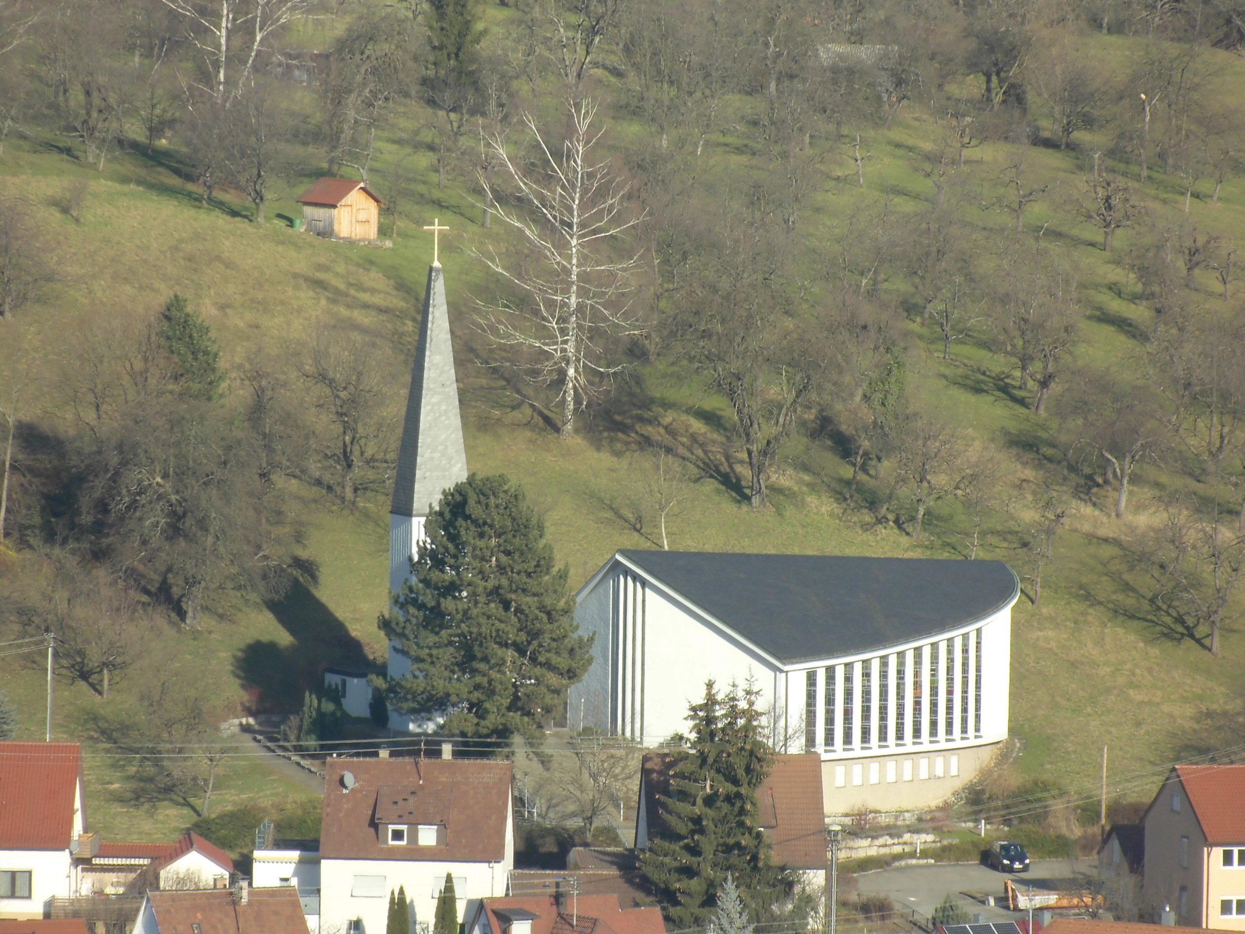 katholische Kirche - Maria zum guten Stein in Dettingen an der Erms Wolfgartenweg 17